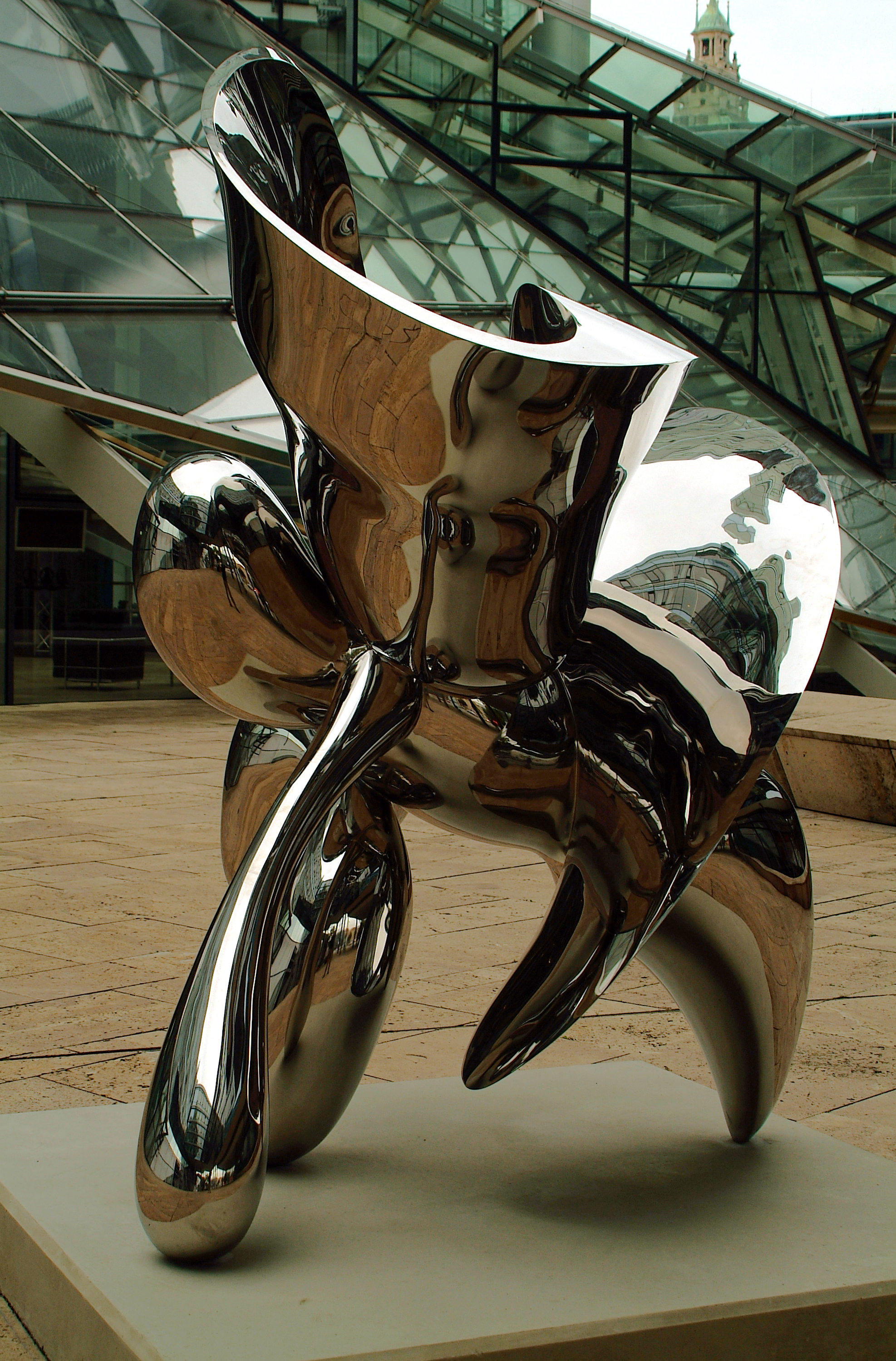 Die Verbeugung von Distant Cousin des Künstlers Tony Cragg lasse ich mir gern gefallen - gleichwohl: Wo ist der Mann mit Hut? ...